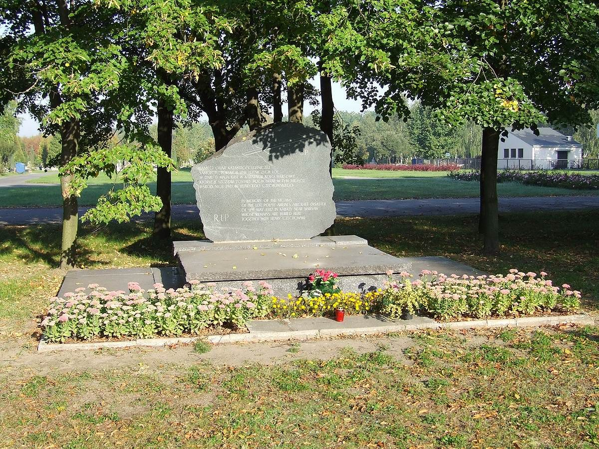 Zbiorowy grób ofiar katastrofy lotniczej na Kabatach na Wólce